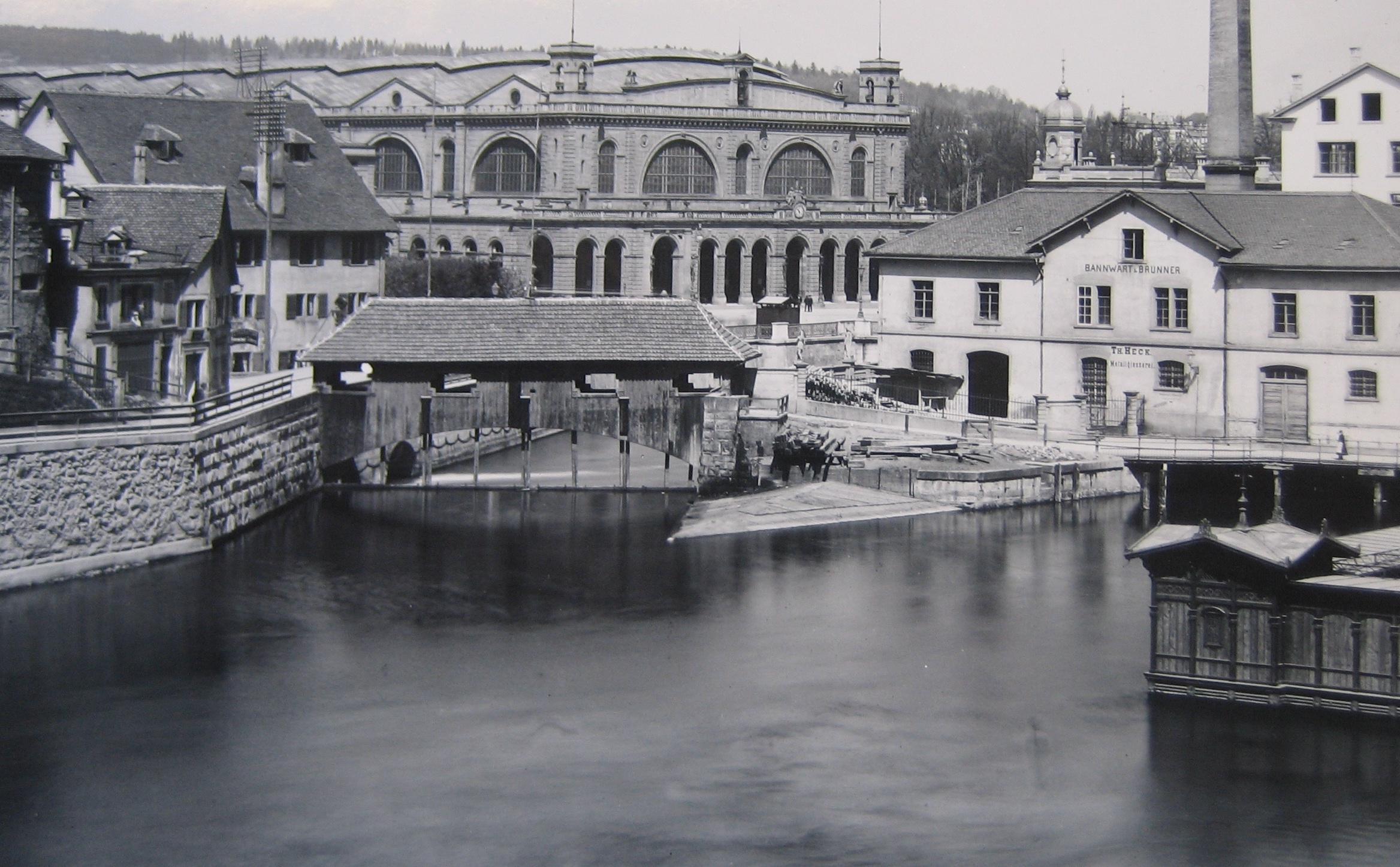 Gedecktes Brüggli in Zürich von Süden, im Hintergrund der Hauptbahnhof, Foto U. Keller, 16.4.1893